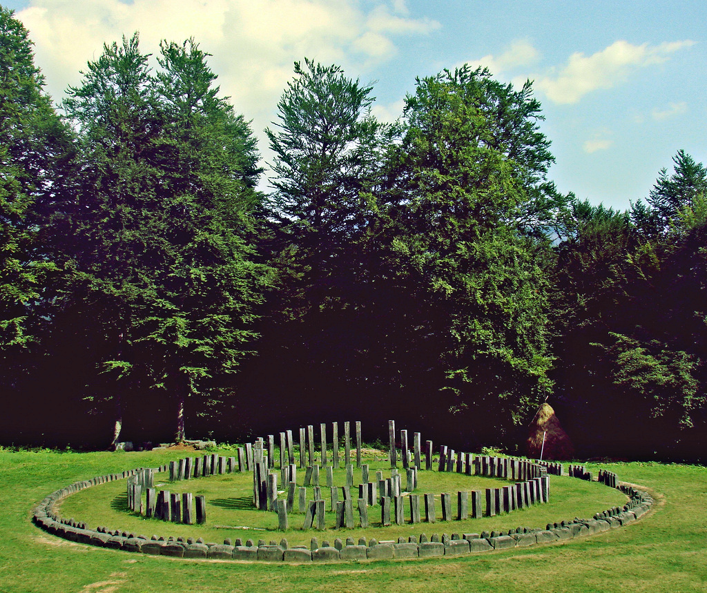 Copy of DSC08266